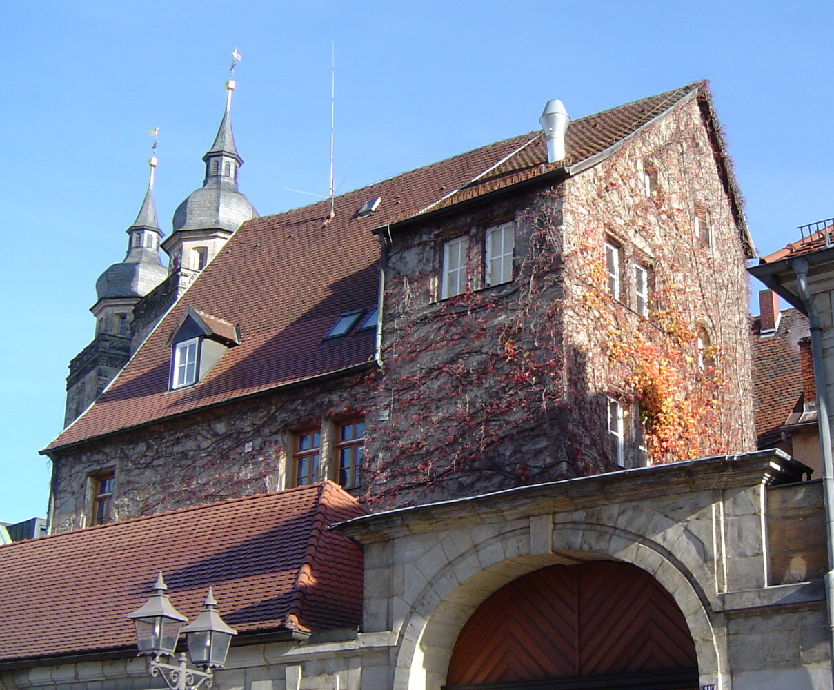 Bayreuth, Kanzleistraße 15, Nanckenreuther Burggut, Wachstube am Oberen Tor